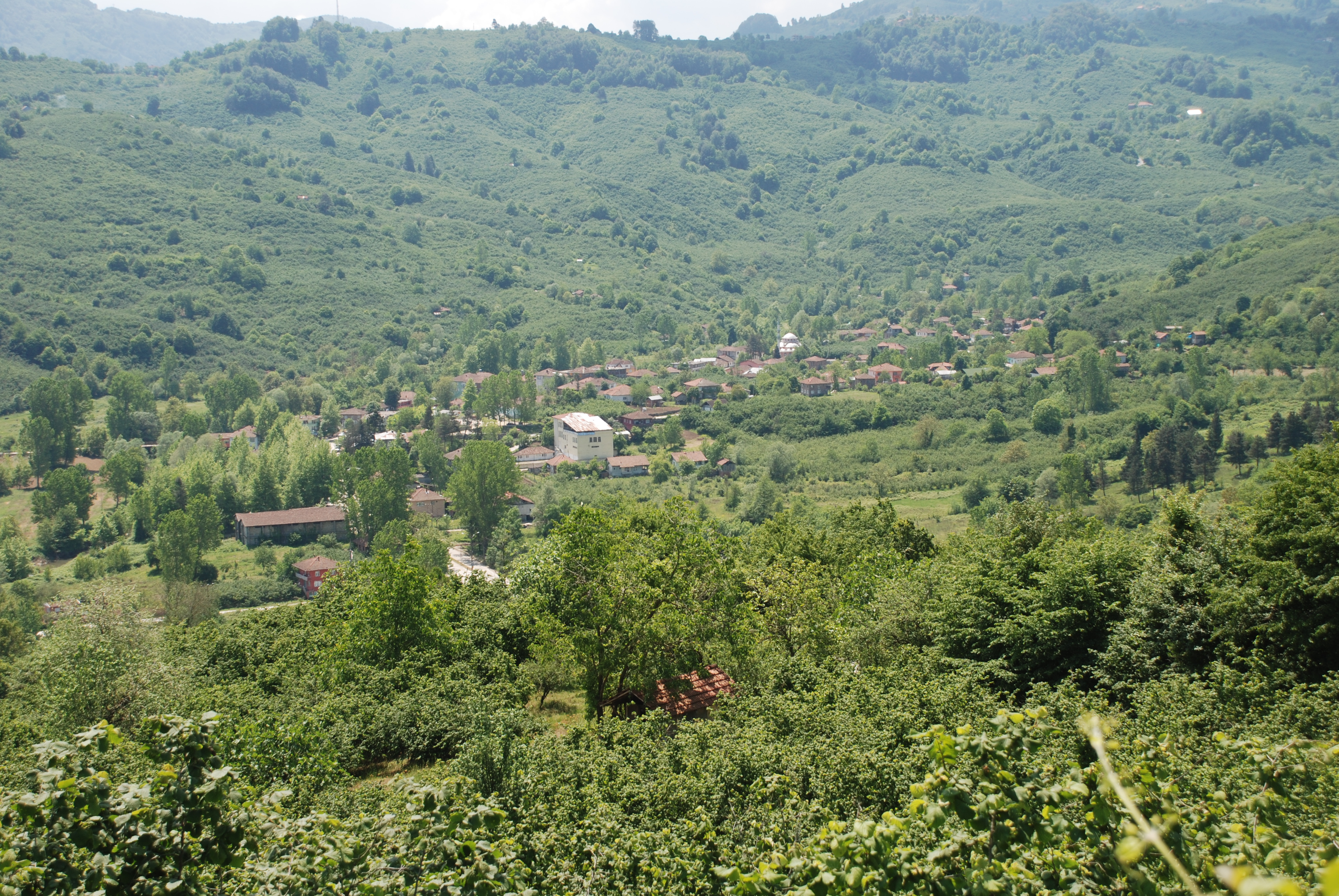 Sakarya ili Kocaali ilçesi Ortaköy beldesi. Yapılmakta olan Melen barajı nedeniyle su altında kalacaktır.